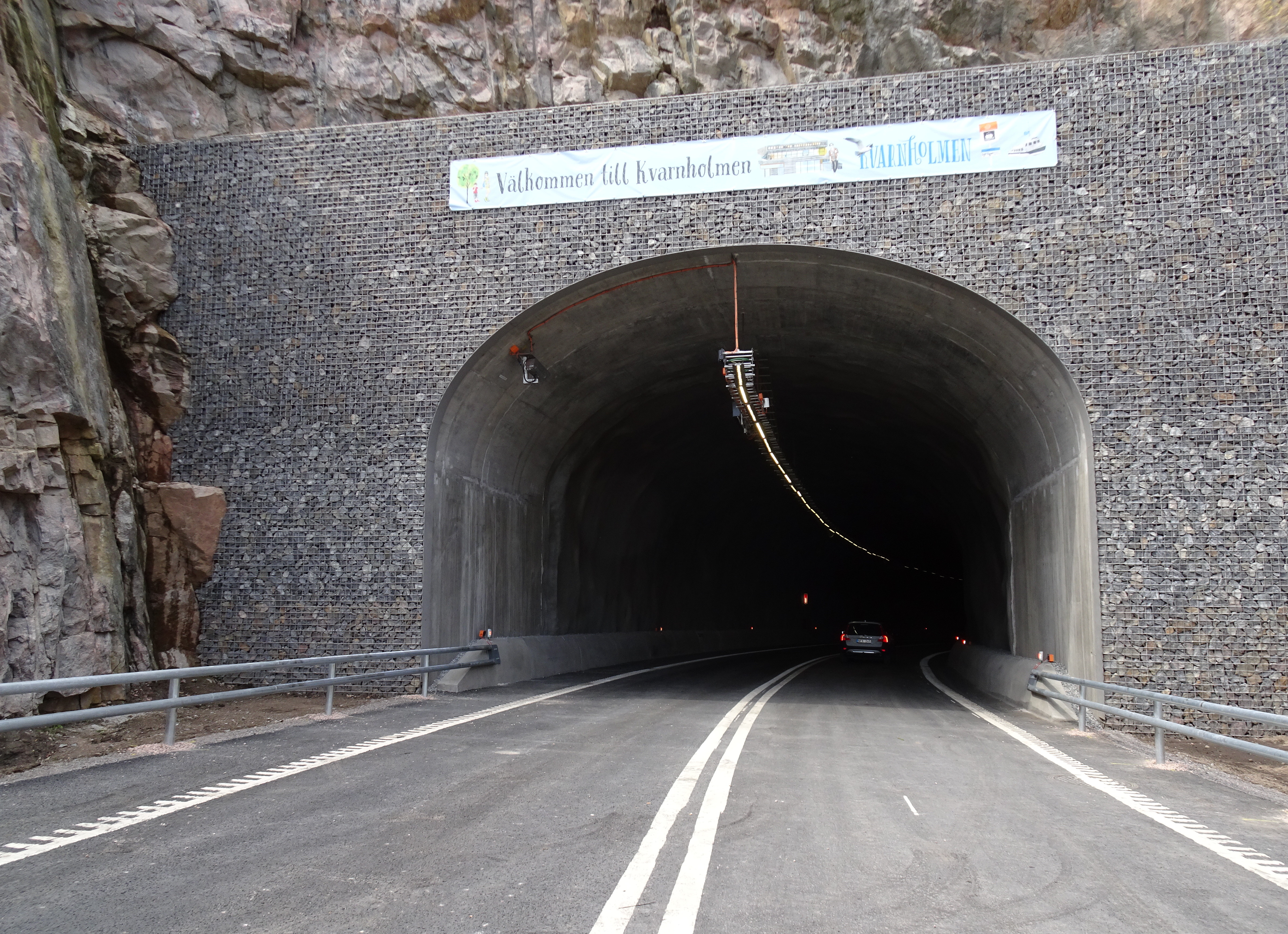 Ryssbergstunneln, södra öppningen